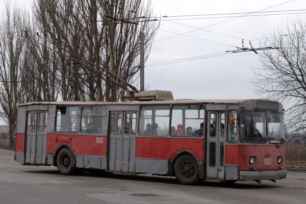 ZiU-9 003 in Wuhlehirsk